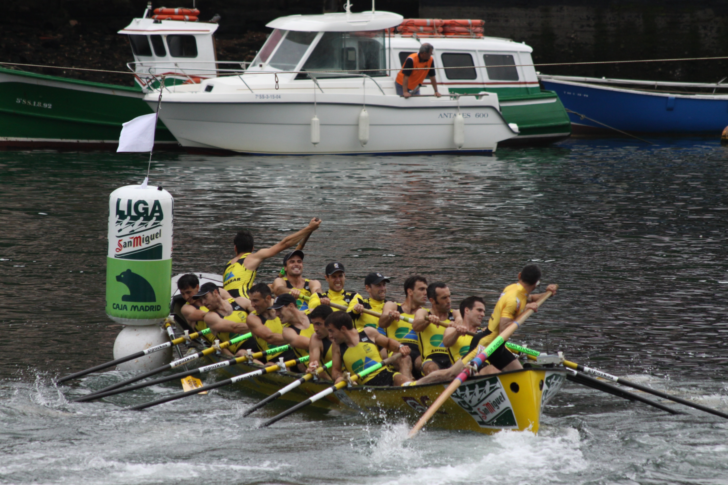 Trainière du club d'aviron d'Orio (Guipuzcoa).